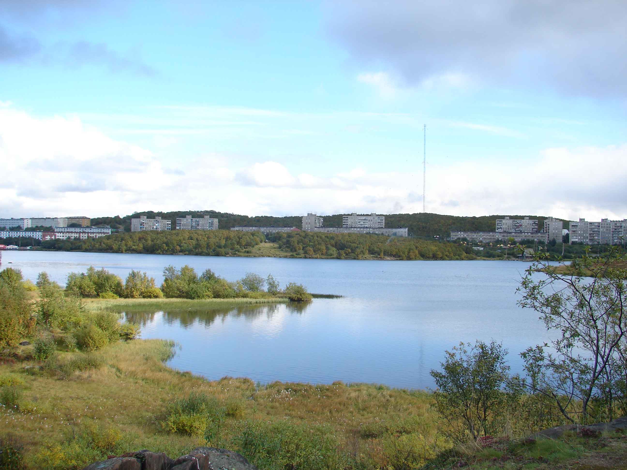 Семёновское озеро вид с запада